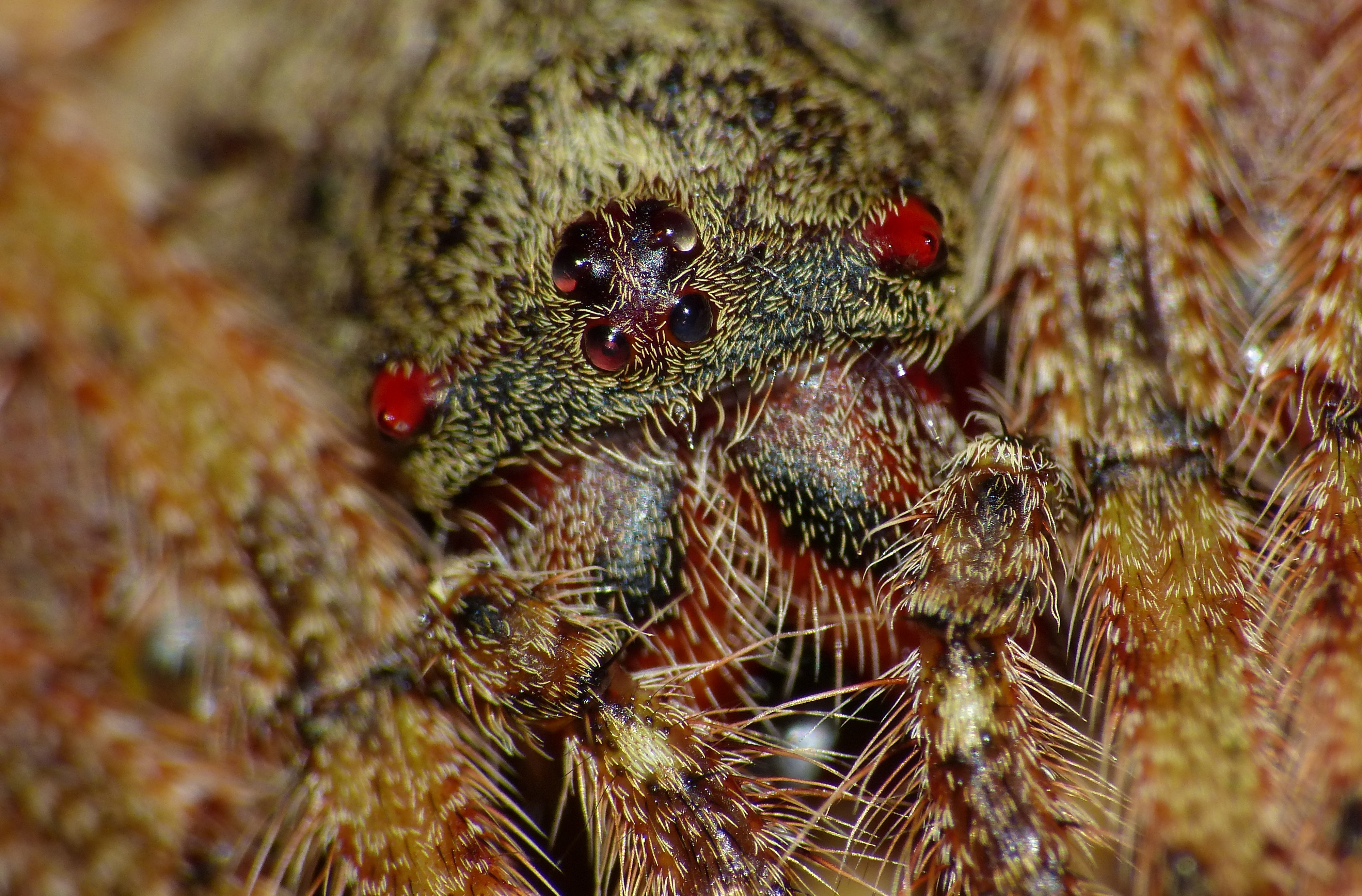 Taman Negara NP, Pahang, MALAYSIA